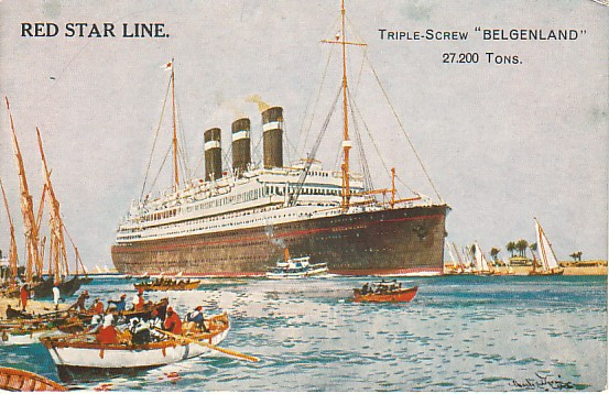 Postcard of SS Belgenland (1914)